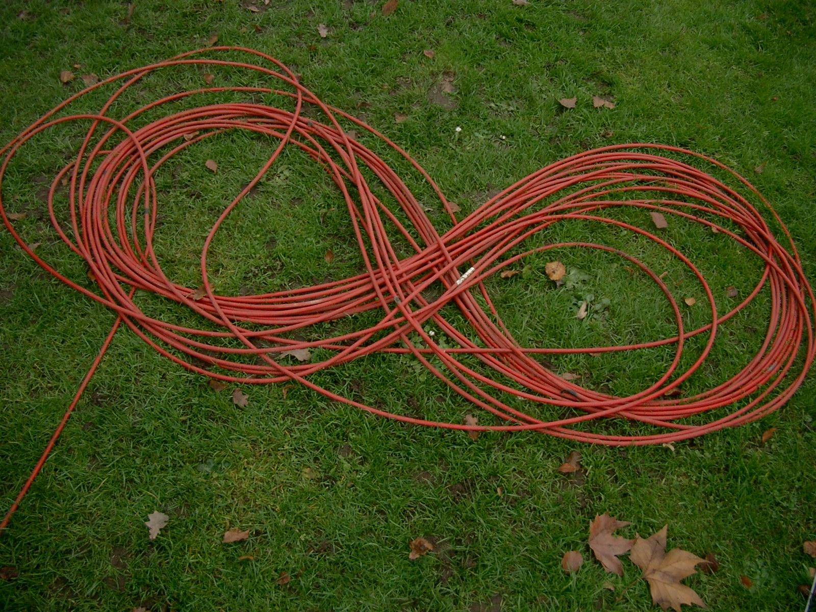 Kabelacht eines TRIAX-Kamerakabels